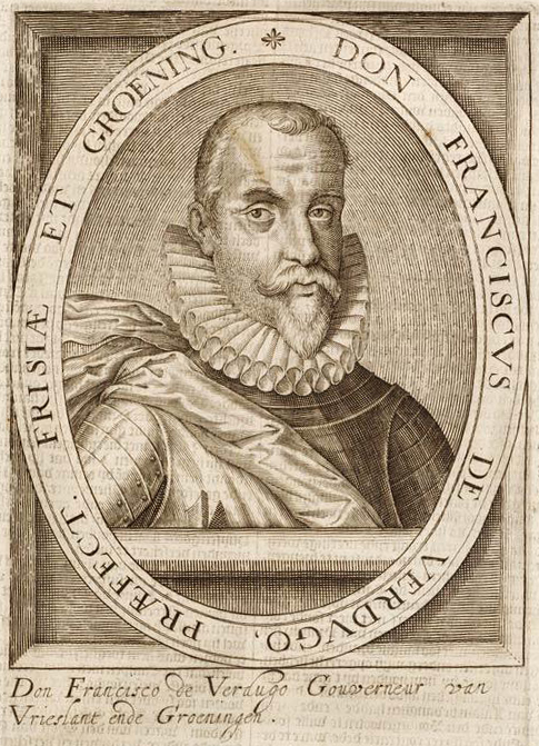 'Don Francisco de Verdugo, Gouverneur van Vrieslant ende Groeningen', Francisco Verdugo (1537-1595)